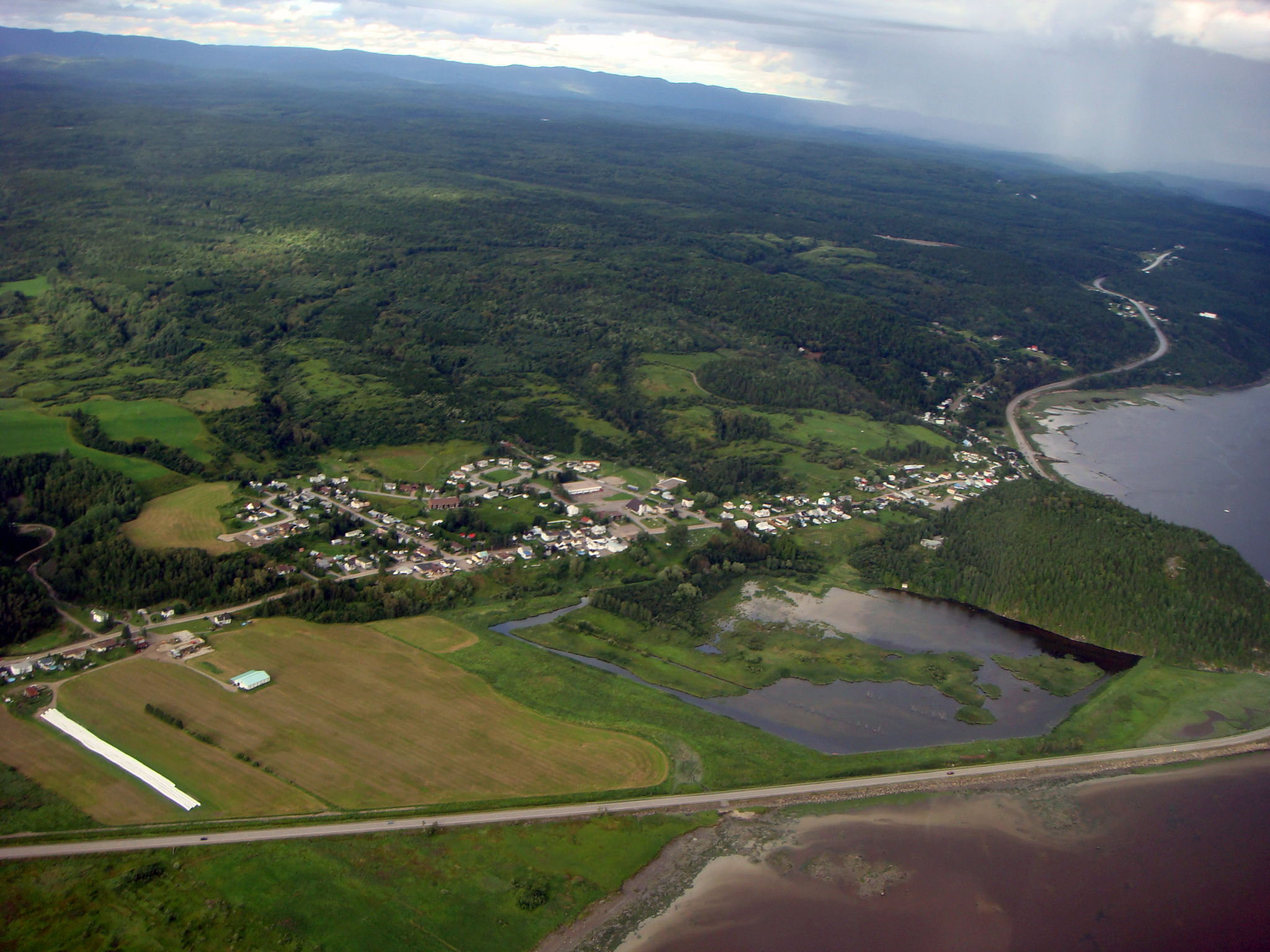 Vue aérienne de Saint-Fulgence.